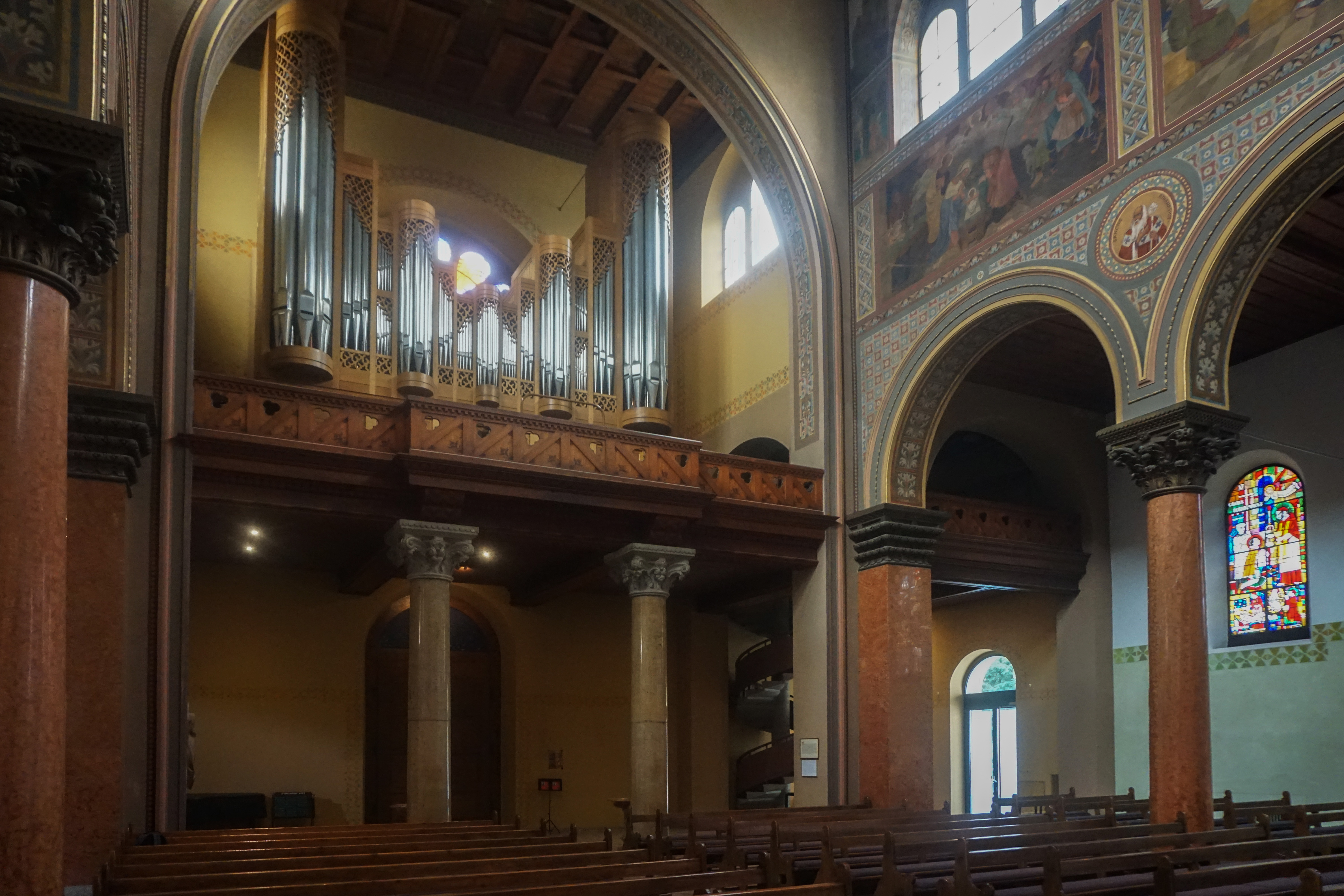 Dreifaltigkeitskirche in Bern, Hauptorgel auf der Empore